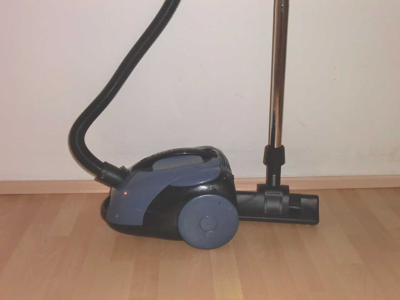 Český vysavač ETA 0414 Draco